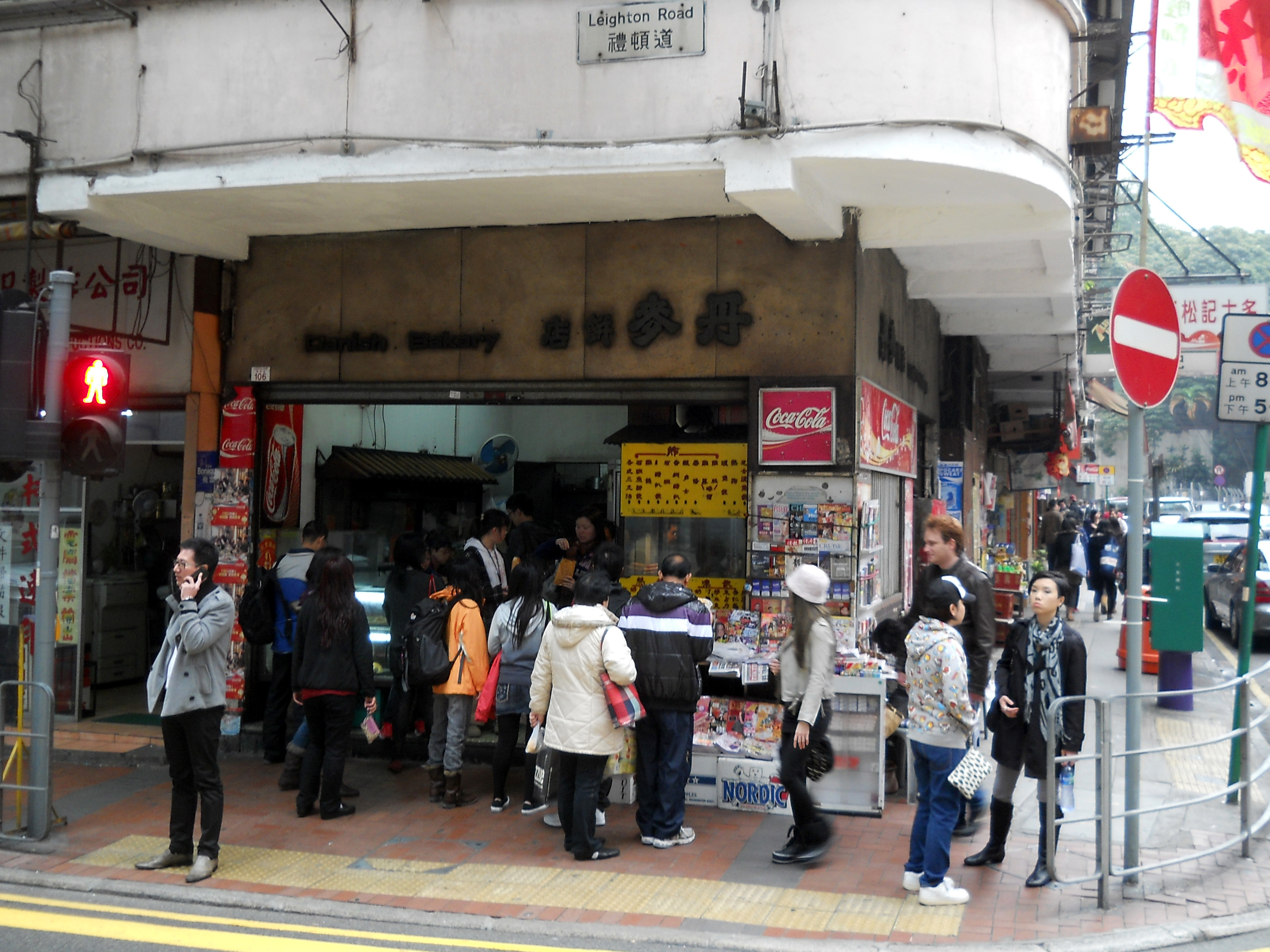 中文（香港）: 丹麥餅店